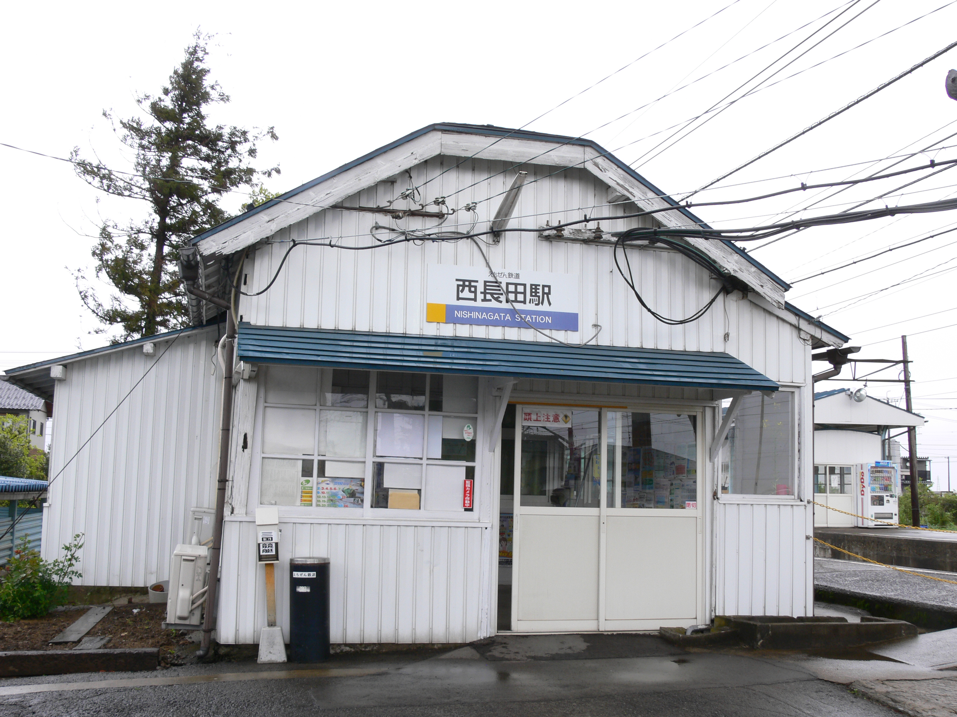 Nishi-Nagata Station 西長田駅 駅舎